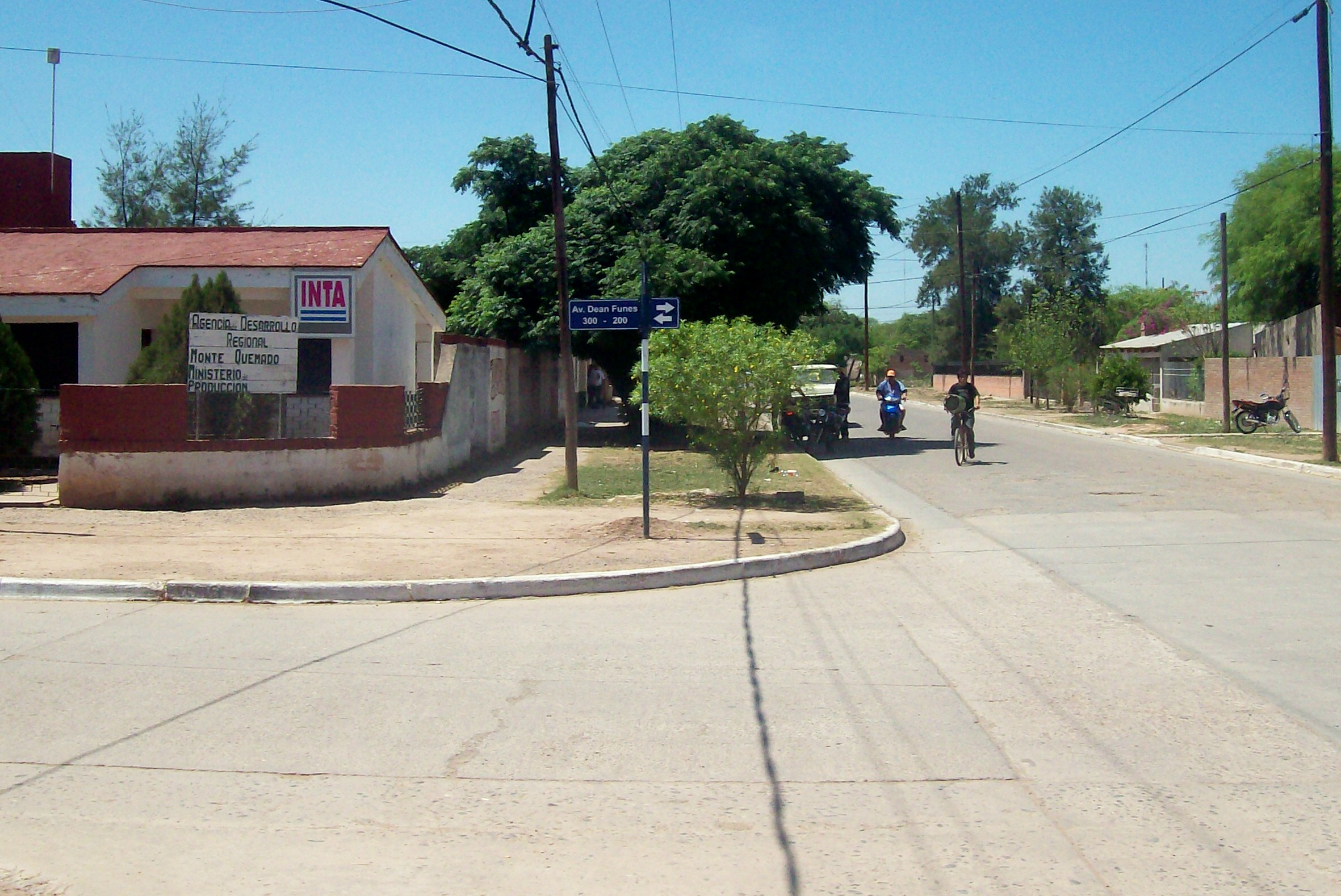 Monte Quemado, Copo, Provincia de Santiago del Estero. Calle Dean Funes al 200-300. Estación Regional del Inta.